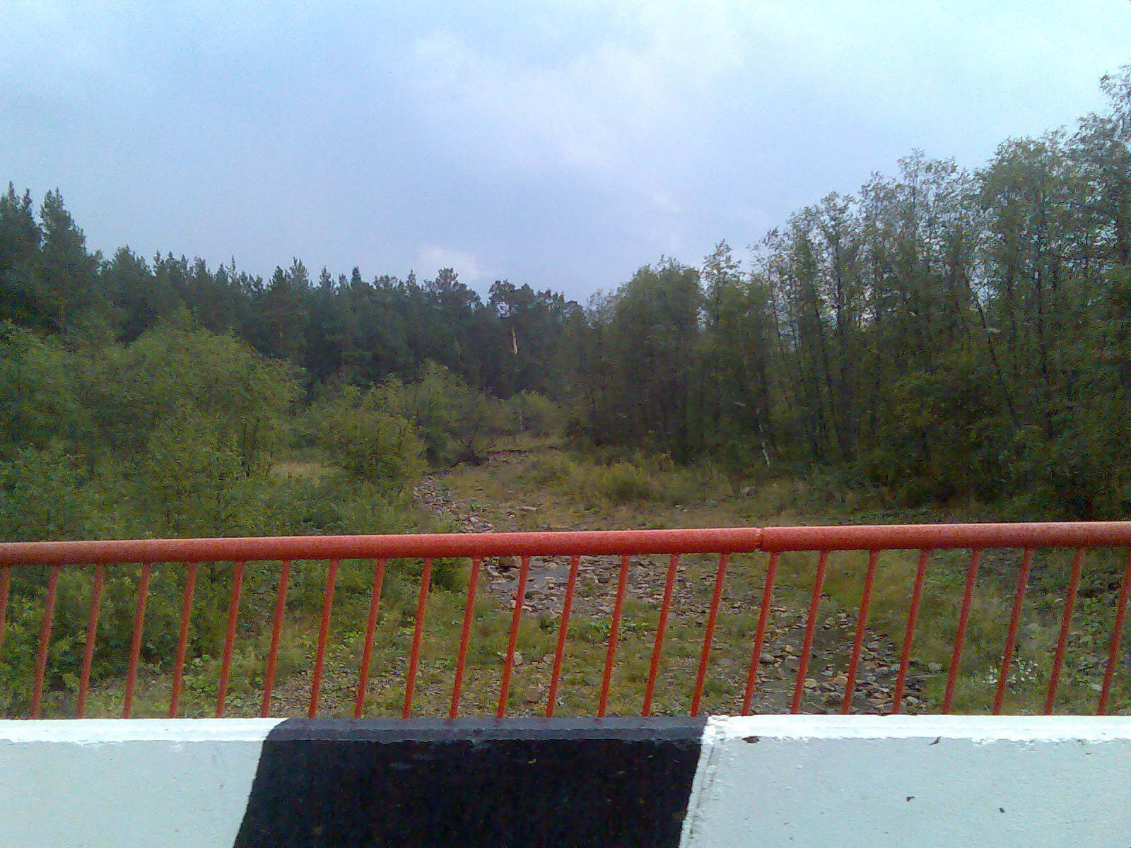 Речка Тюлюк без воды